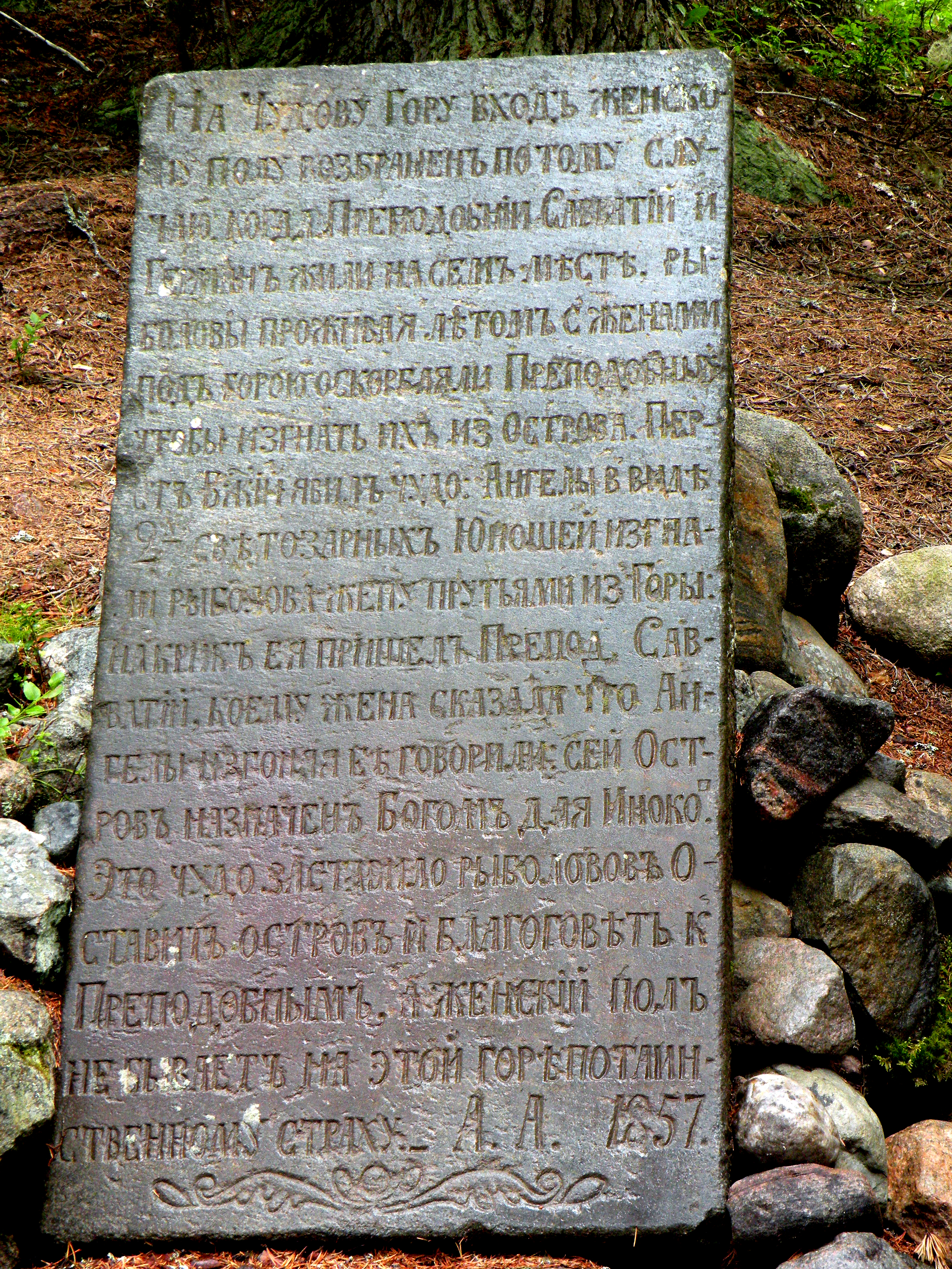 Древняя плита , содержащая легенду. Монастырские власти стремились не допускать лиц женского пола на подчинённые им территории. На каменной плите изложена легенда о том, как два ангела высекли женщину, пытавшуюся проникнуть на Секирную гору. Отсюда и пошло её название.